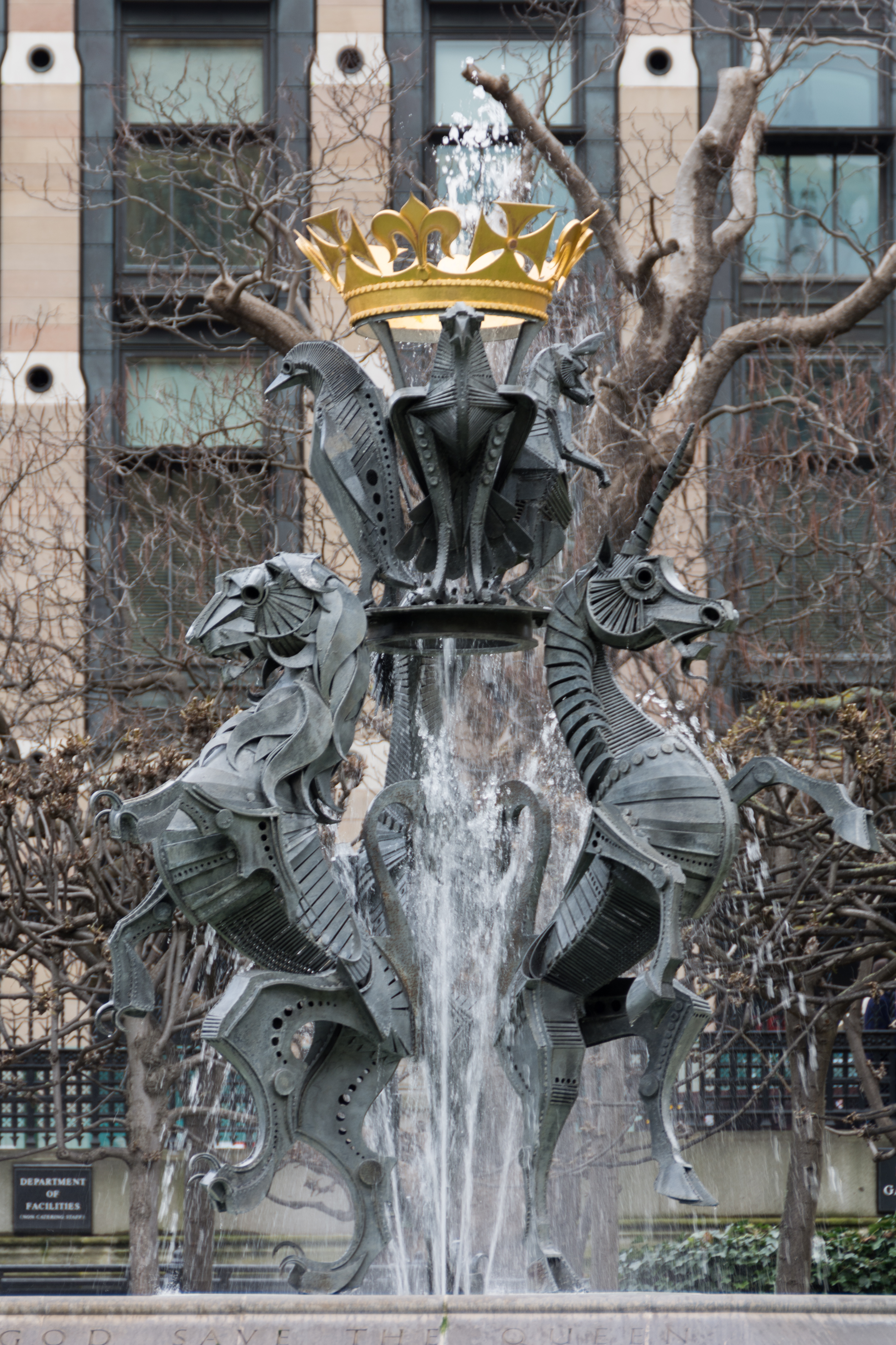 Londyn